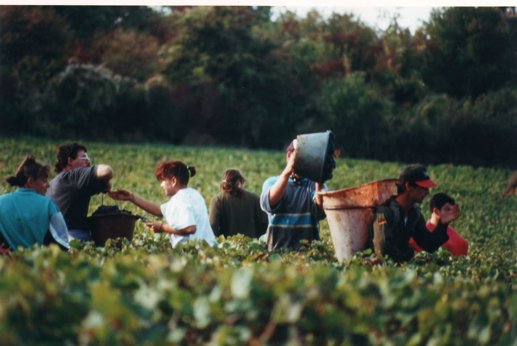 vendanges manuelles